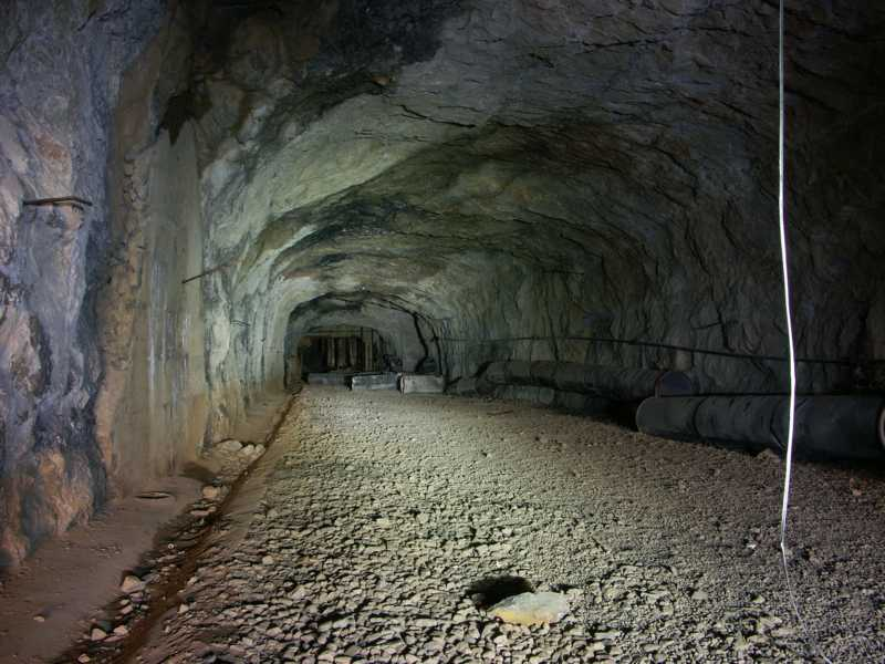 Das Projekt Schwalbe I war eines der größten geheimen Bauprojekte des Dritten Reiches. Die U-Verlagerung mit dem Decknamen „Eisenkies“ (der Mineralname ist hier die Kennung für eine neue, eigens eingerichtete Stollenanlage) ist eine der größten Stollenanlagen im Sauerland. Bauherr war die Firma Rheinbraun-Braun-Union Wesseling, die in der Stollenanlage ein Hydrierwerk zur Treibstoffherstellung und ein Dehydrierwerk zur Herstellung von Kerosin errichten ließ. 30.000 t Treibstoff sollten monatlich das Werk verlassen.